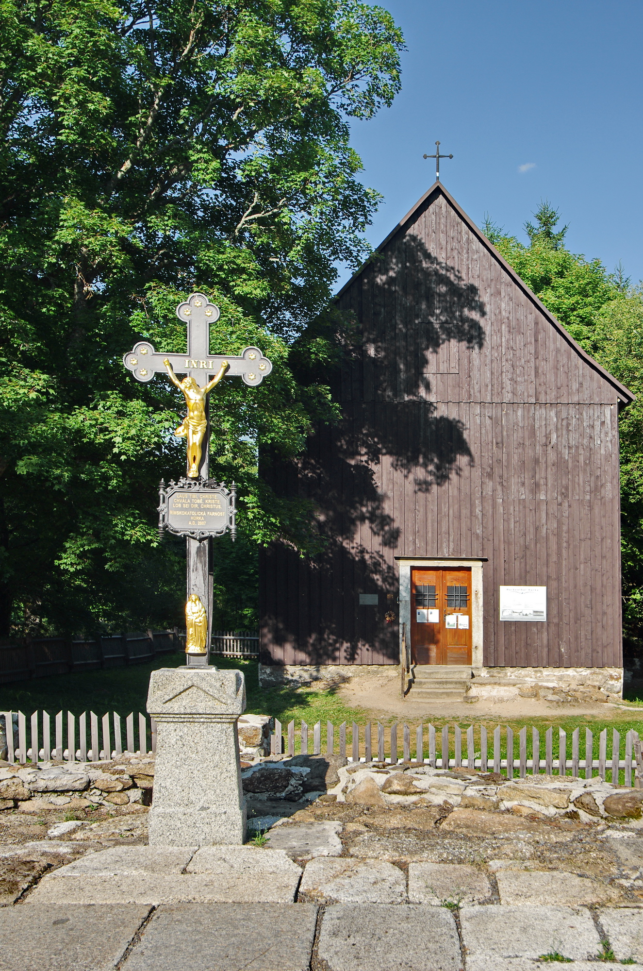 Zaniklá Stará Hůrka u Prášil, okres Klatovy